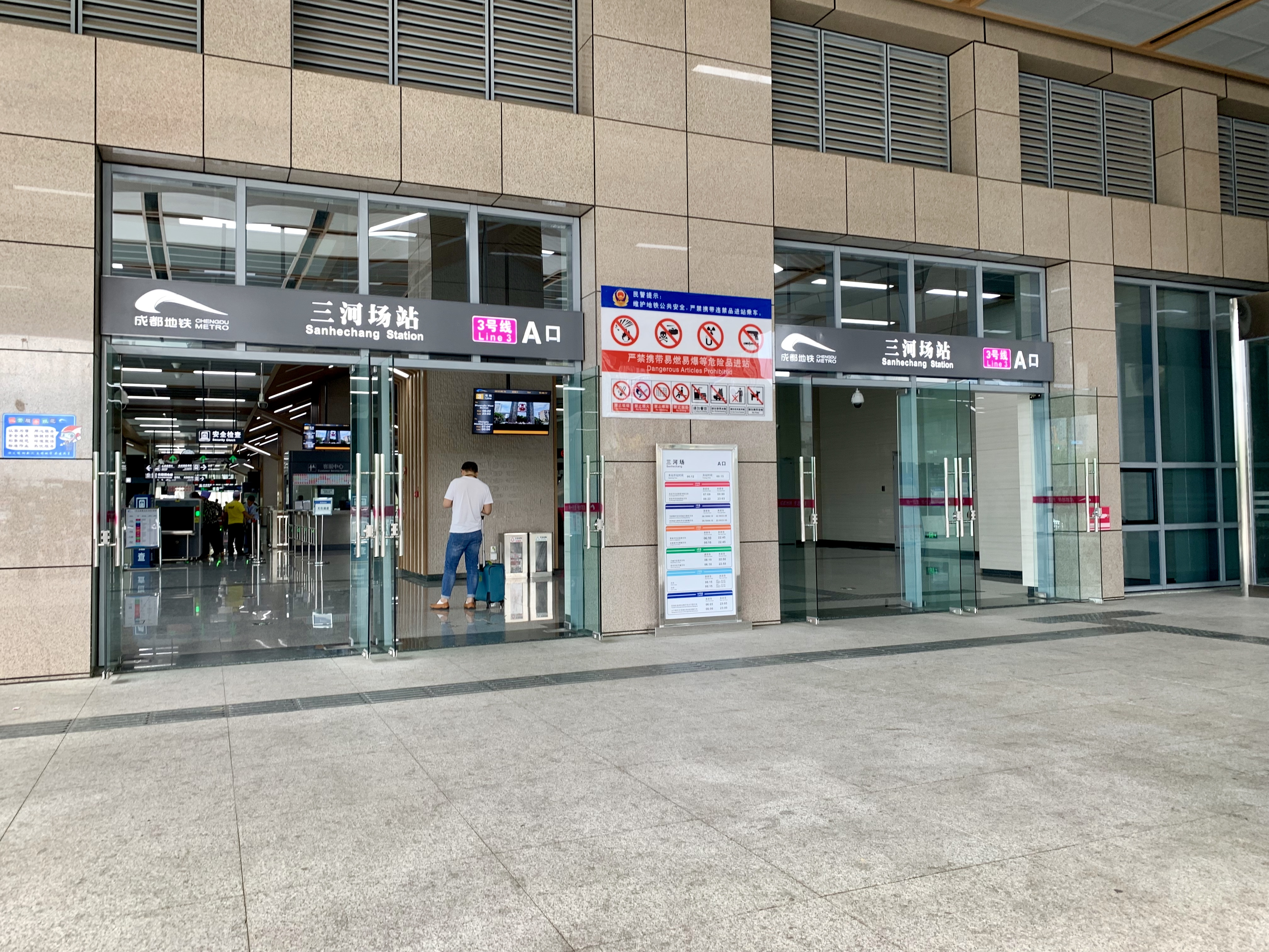 成都地铁三河场站